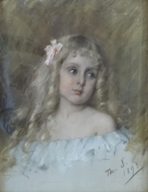 Thérèse Schwartze, Meisje met pijpenkrullen, 54,5 x 43 cm.